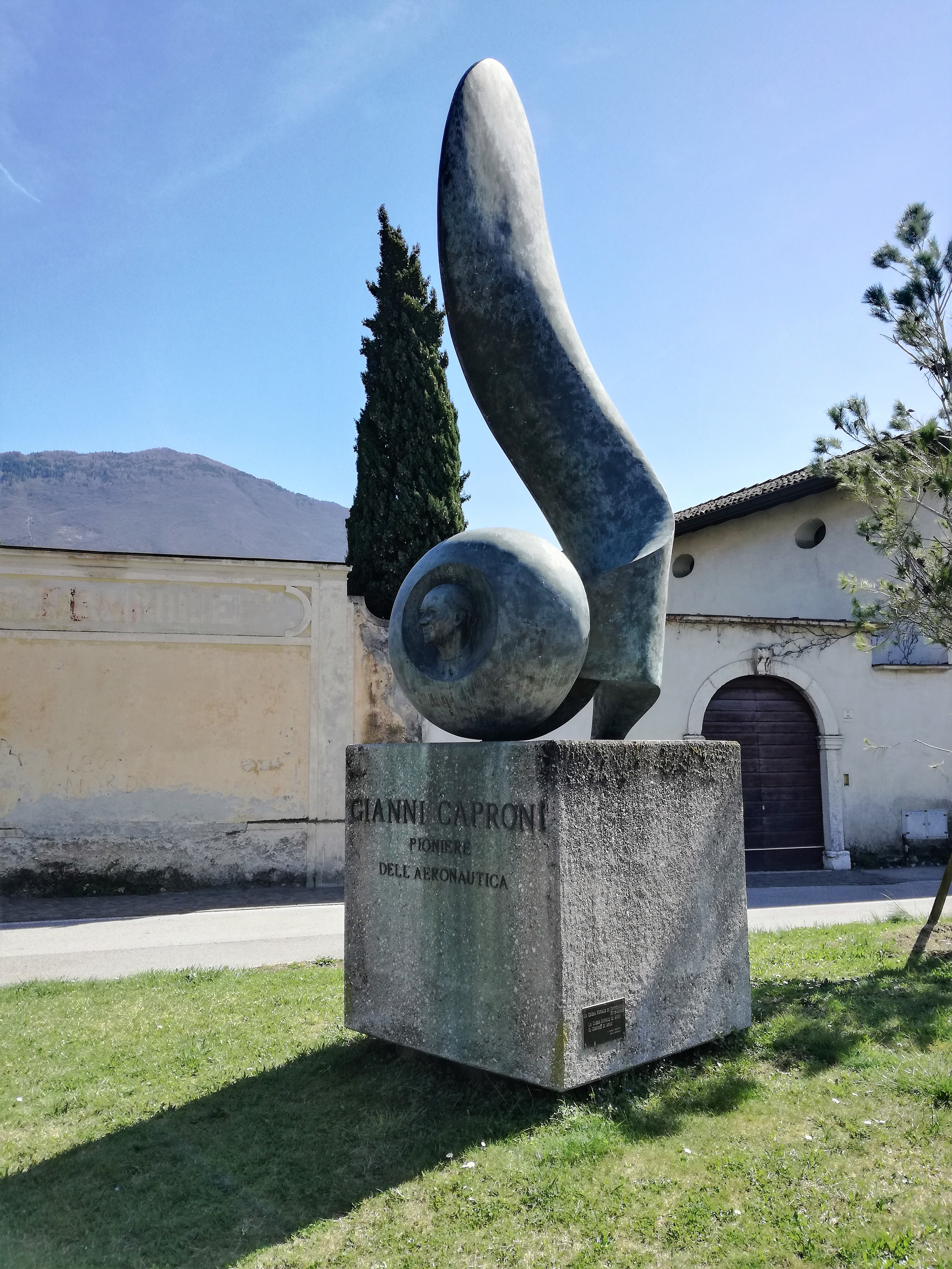 Gianni Caproni Denkmal Arco (Trentino)